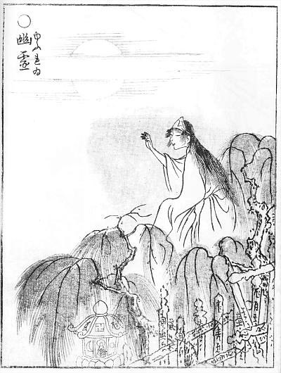 Yūrei (幽霊) from the Gazu Hyakki Yakō (画図百鬼夜行)